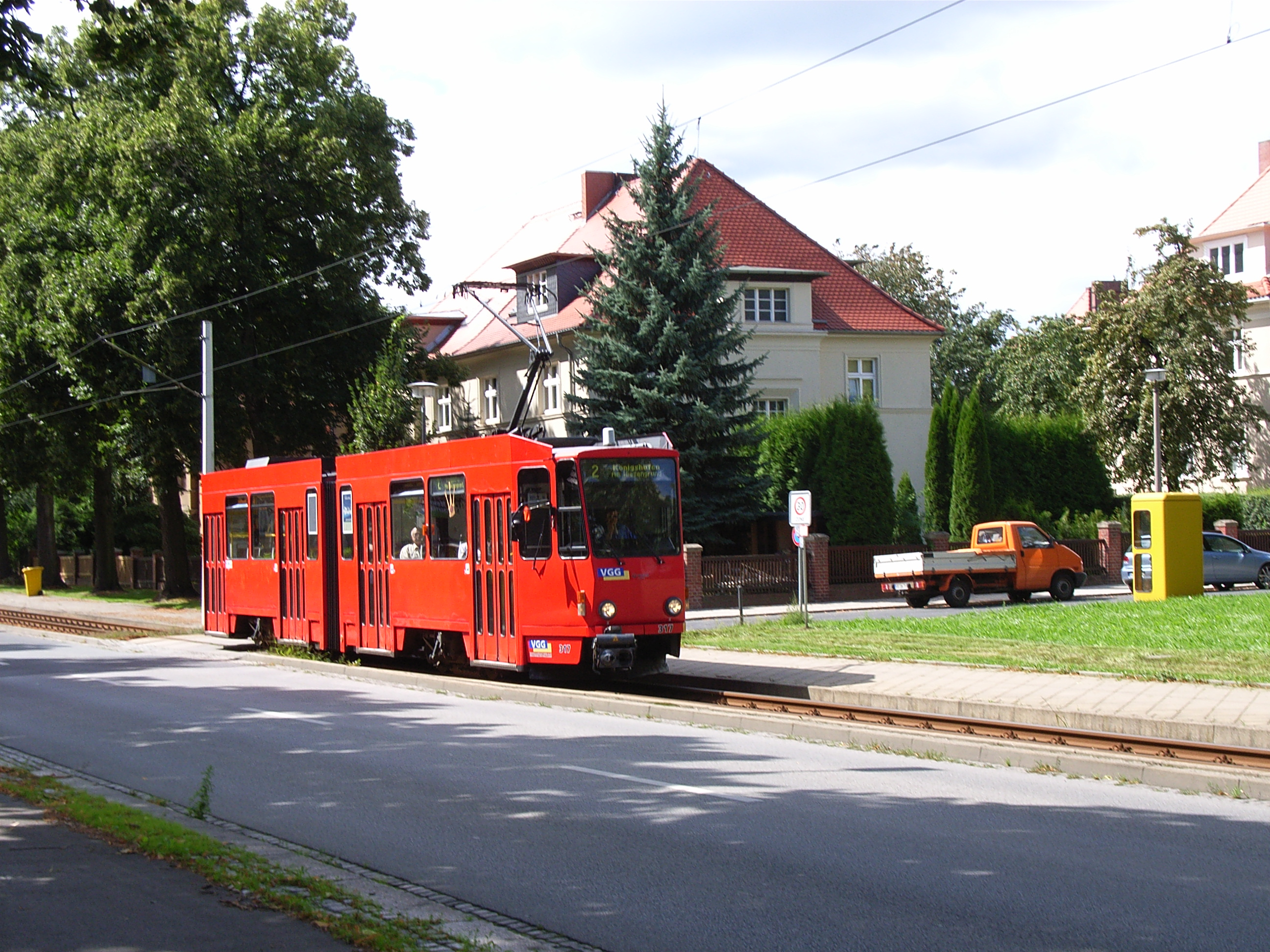 Tatra KT4D, Wagen 317 unterwegs auf Linie 2 von Biesnitz/Landeskrone nach Königshufen/Am Wiesengrund auf der Promenadenstraße kurz vor der Einfahrt zur Haltestelle Büchtemannstraße